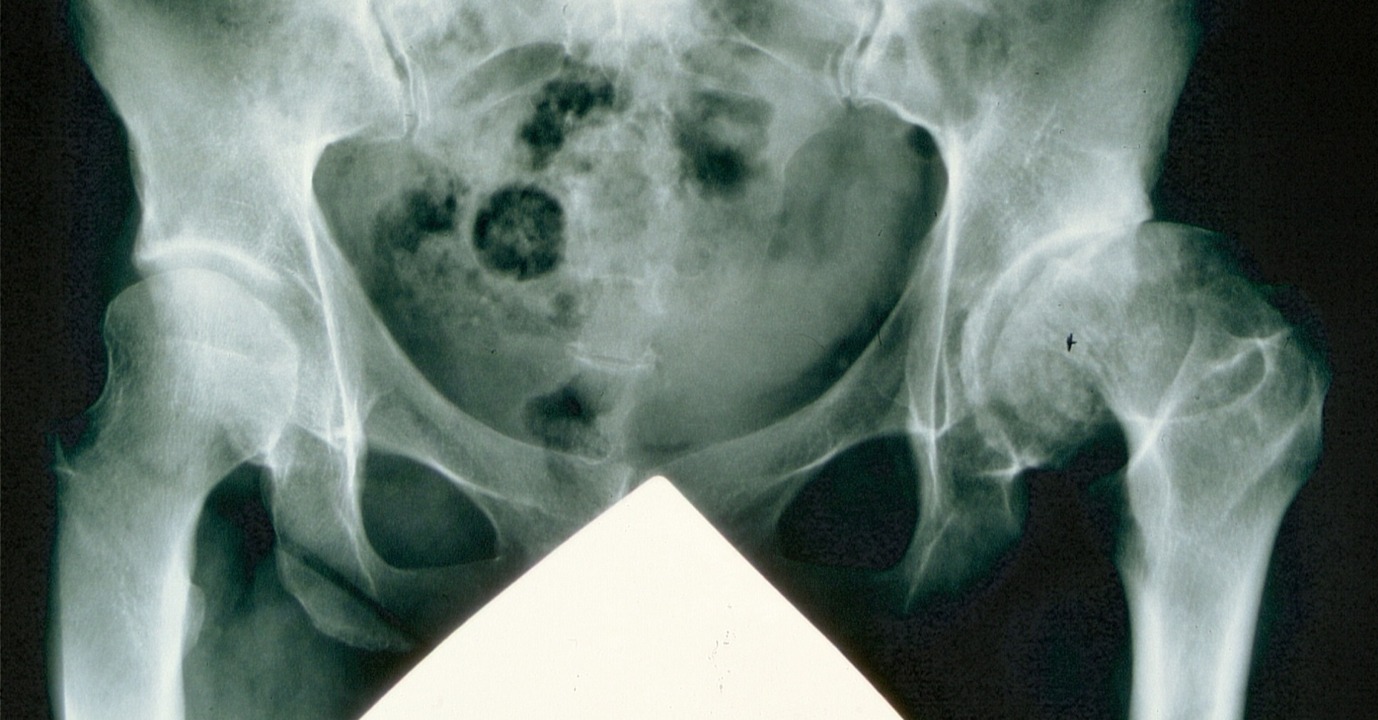 Dysplastische Koxa valga rechts und in der Kindheit durchgemachte Femurkopflösung links bei einem 58-jährigen Mann